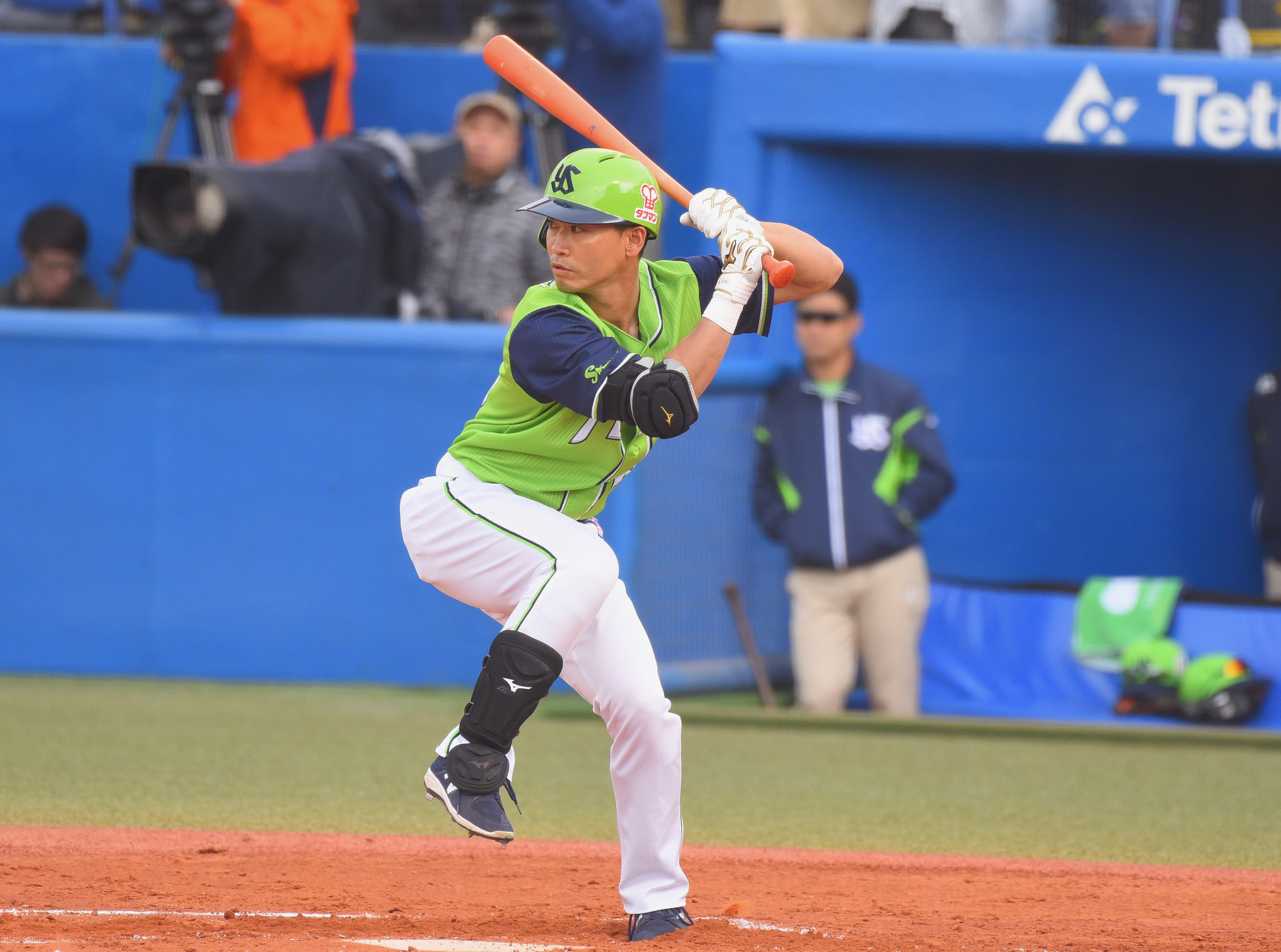 東京ヤクルトスワローズ 青木宣親 ２０１８年４月７日 神宮球場